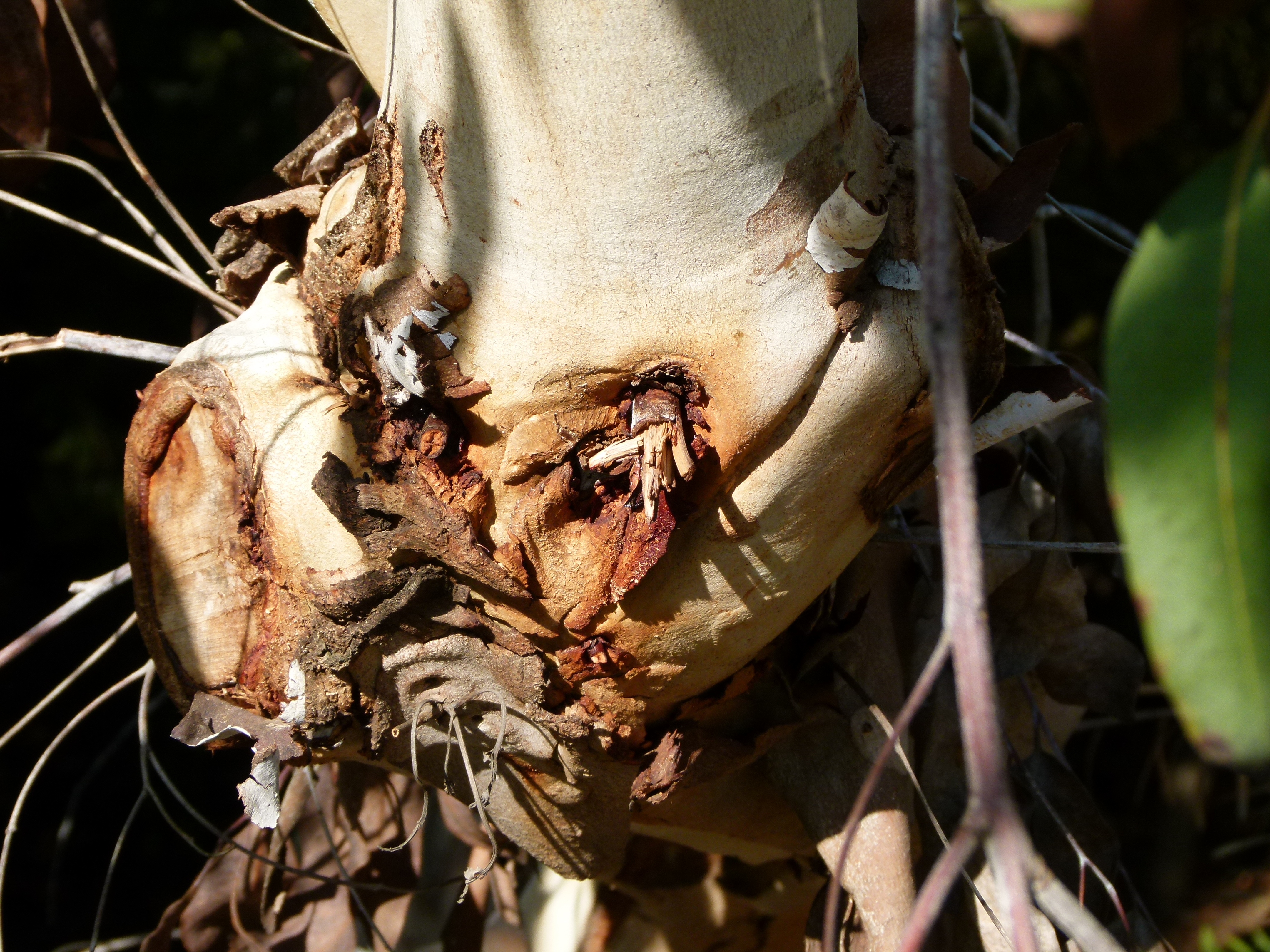 Jardin botanique Barcelone